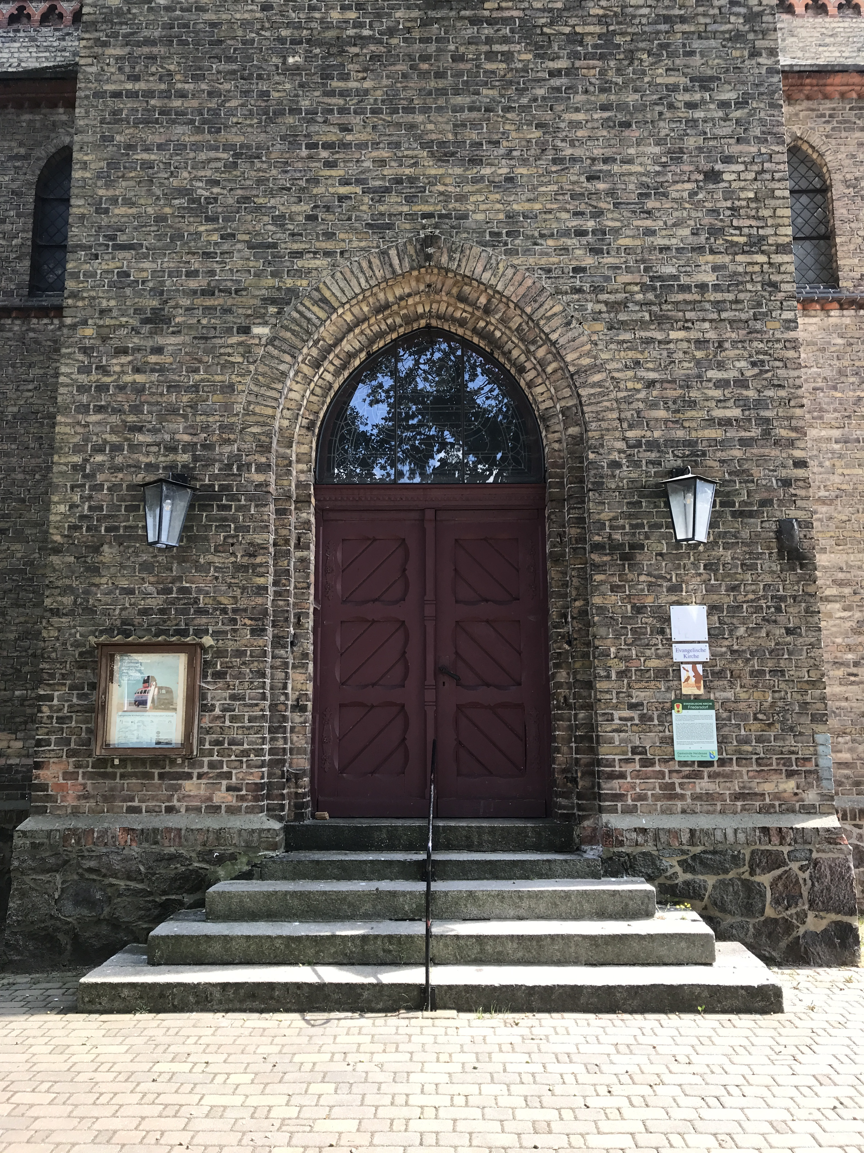 Die Dorfkirche Friedersdorf ist eine neugotische Saalkirche aus den Jahren 1878 bis 1880 in der Gemeinde Heidesee im Landkreis Dahme-Spreewald im Land Brandenburg